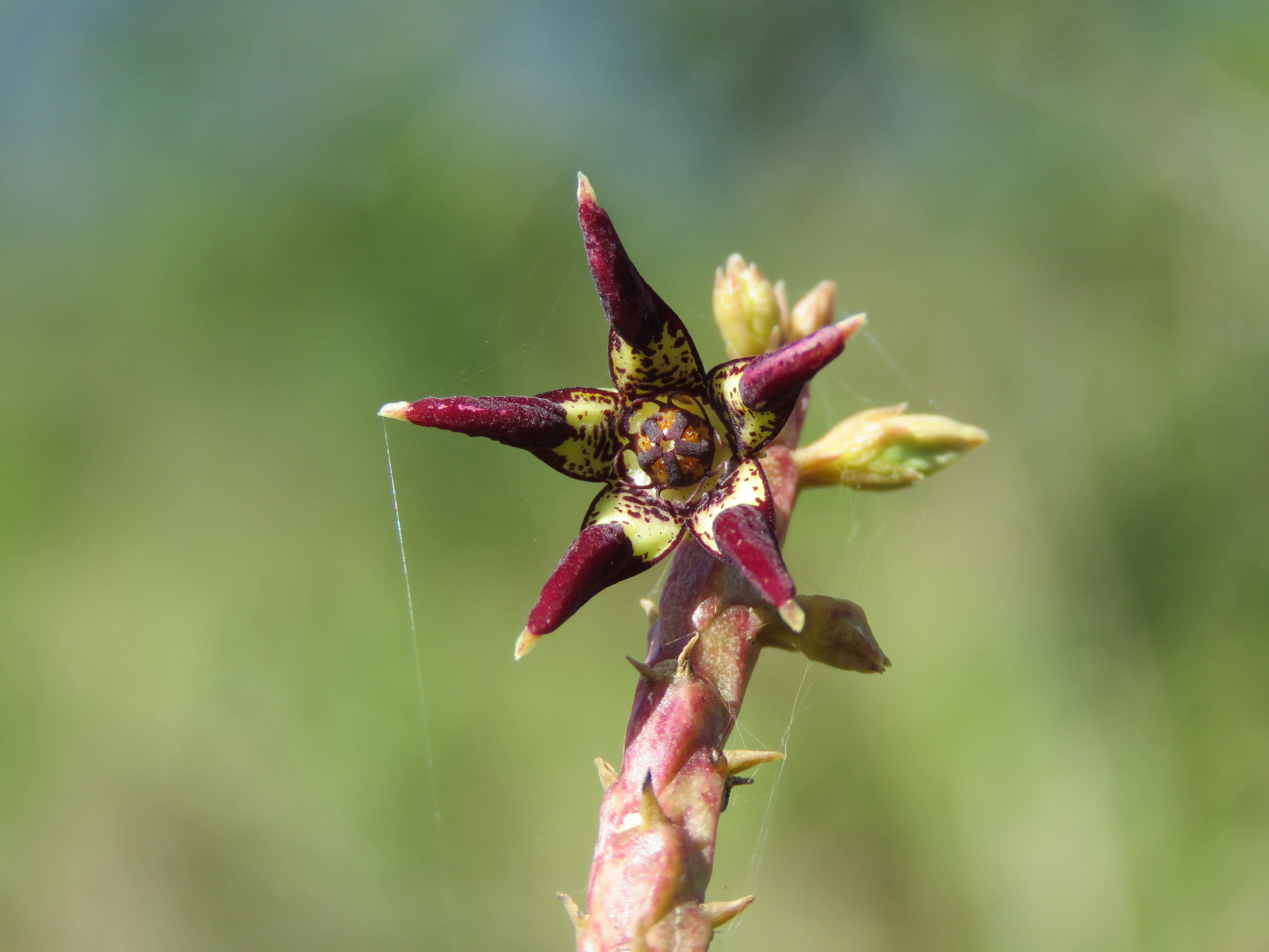 Photos by Vinayaraj